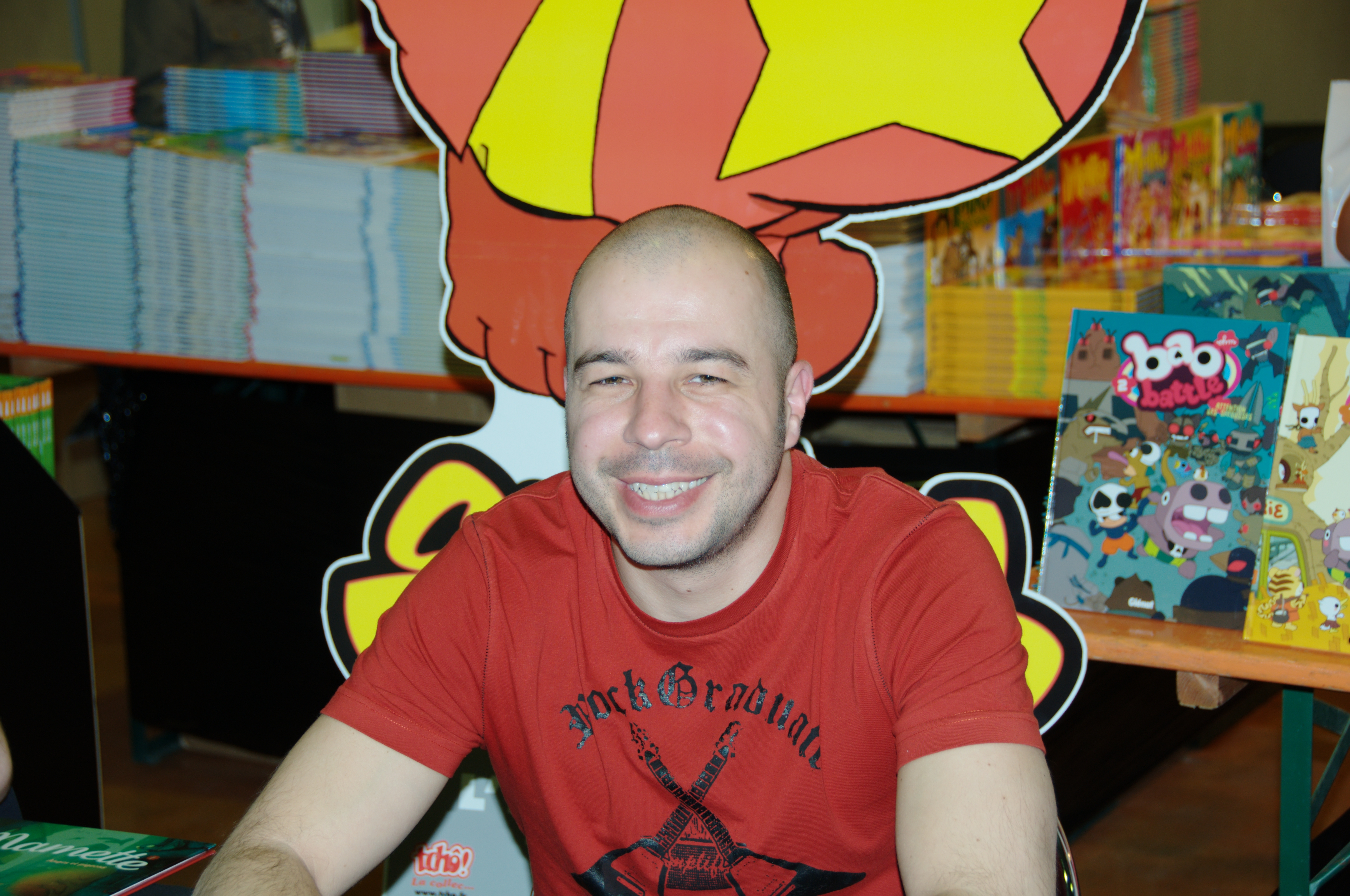 Tébo (Caen, 1972) au festival de bande dessiné de Mandelieu